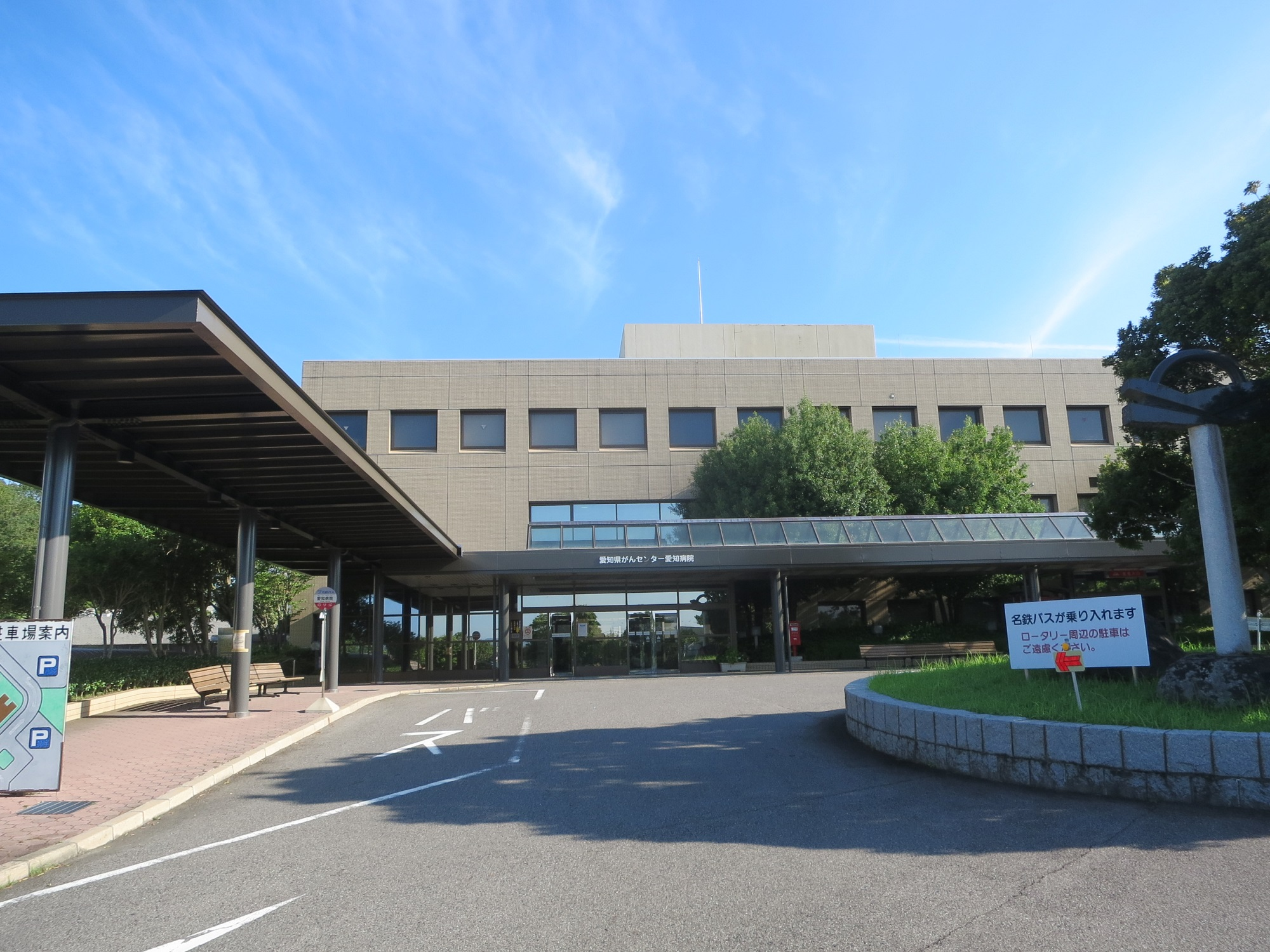 岡崎市立愛知病院（旧愛知県がんセンター愛知病院）